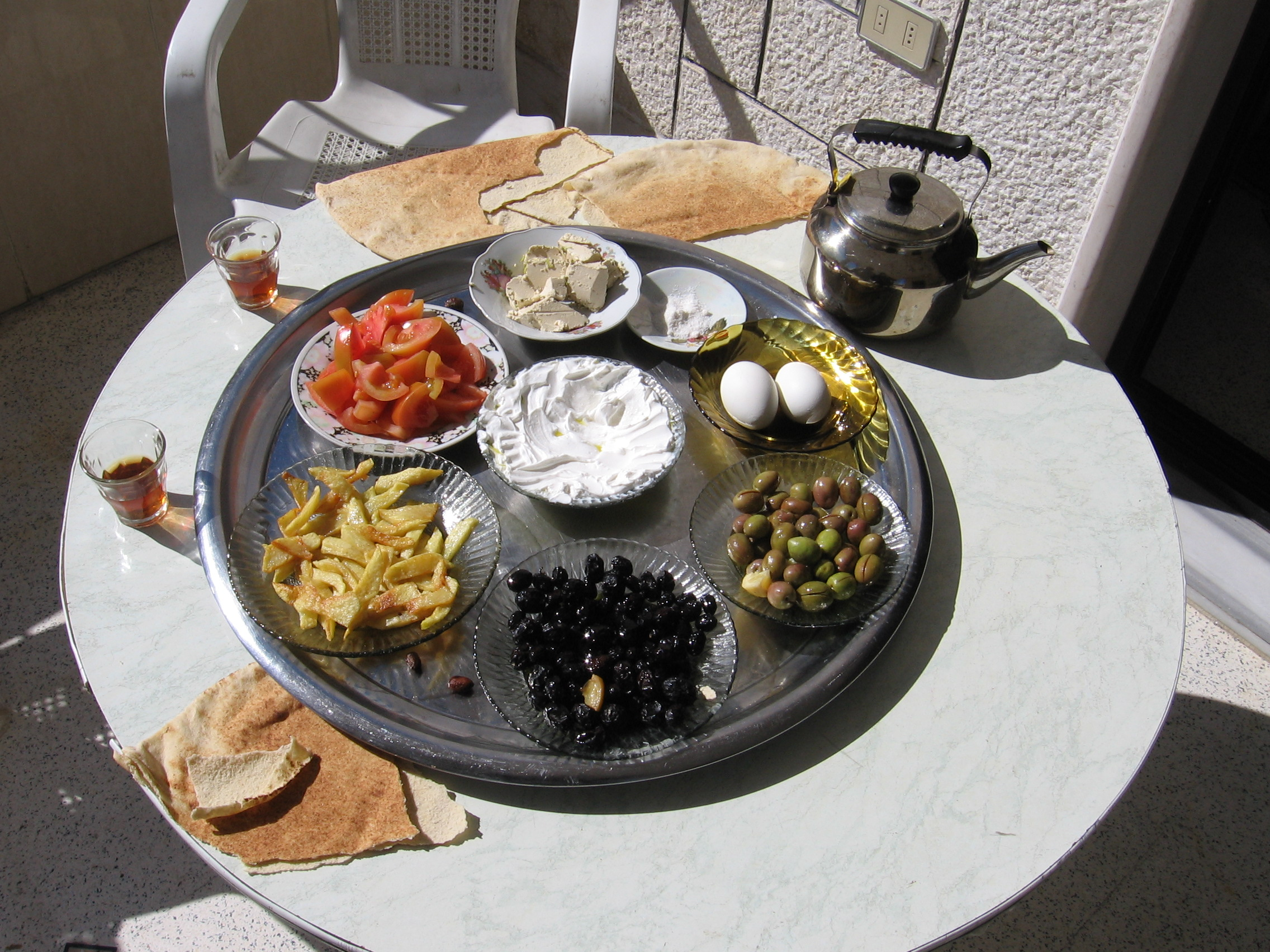 arabian breakfast, do not delay :)